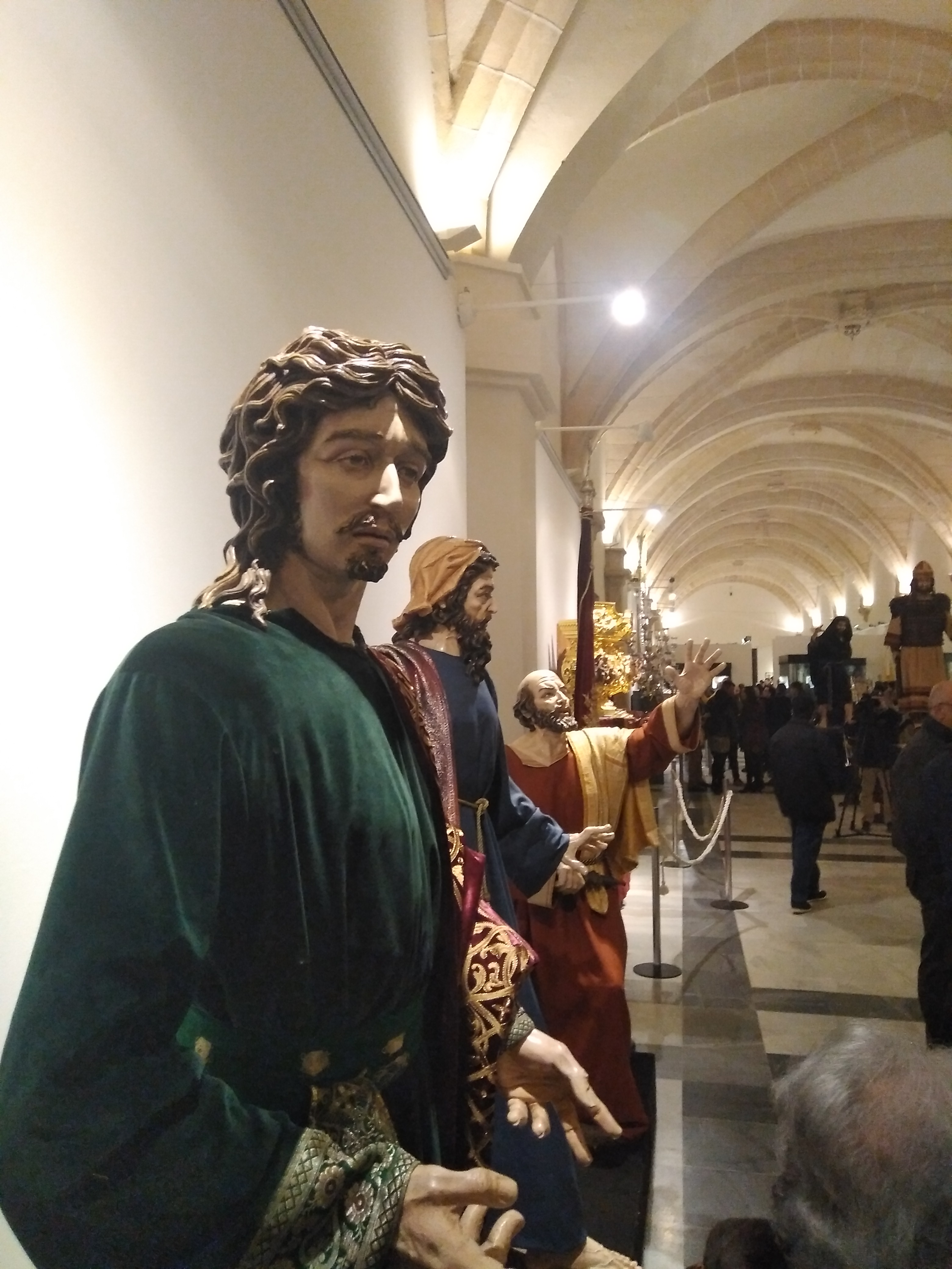 Exposición Magna XXV años de la Hermandad de la Clemencia (Jerez de la Frontera, España), en la Sala De Profundis de los Claustros de Santo Domingo